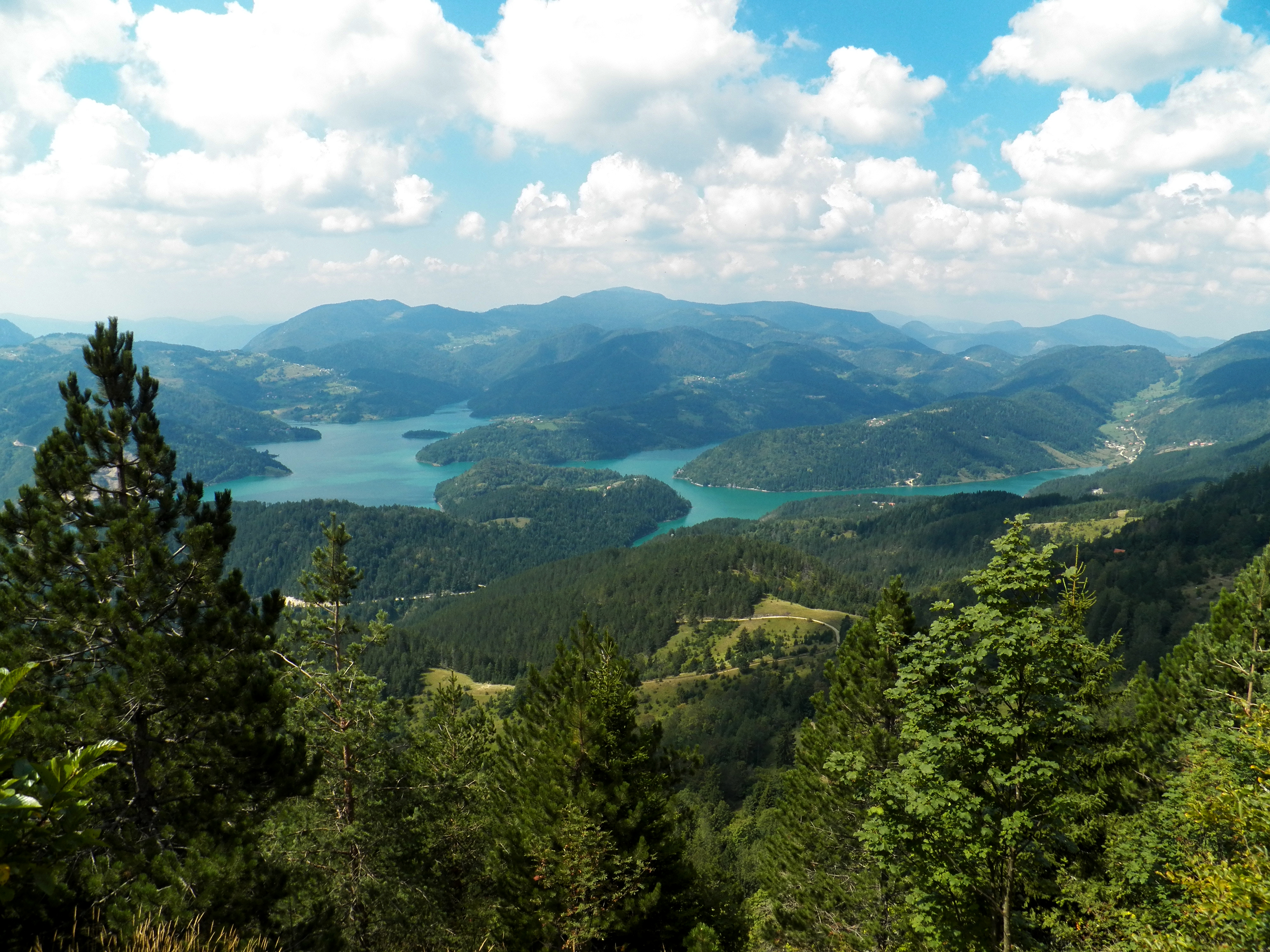 Српски (ћирилица): Гавран, Заовине, Национални парк Тара Ово је фотографија заштићеног природног добра у Србији под шифром: НП03This is a a photo of a natural area in Serbia with ID: НП03